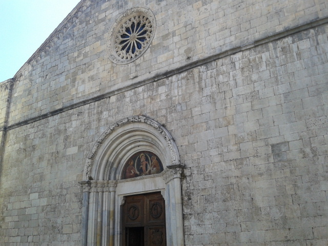 Facciata della chiesa di San Giovanni Battista